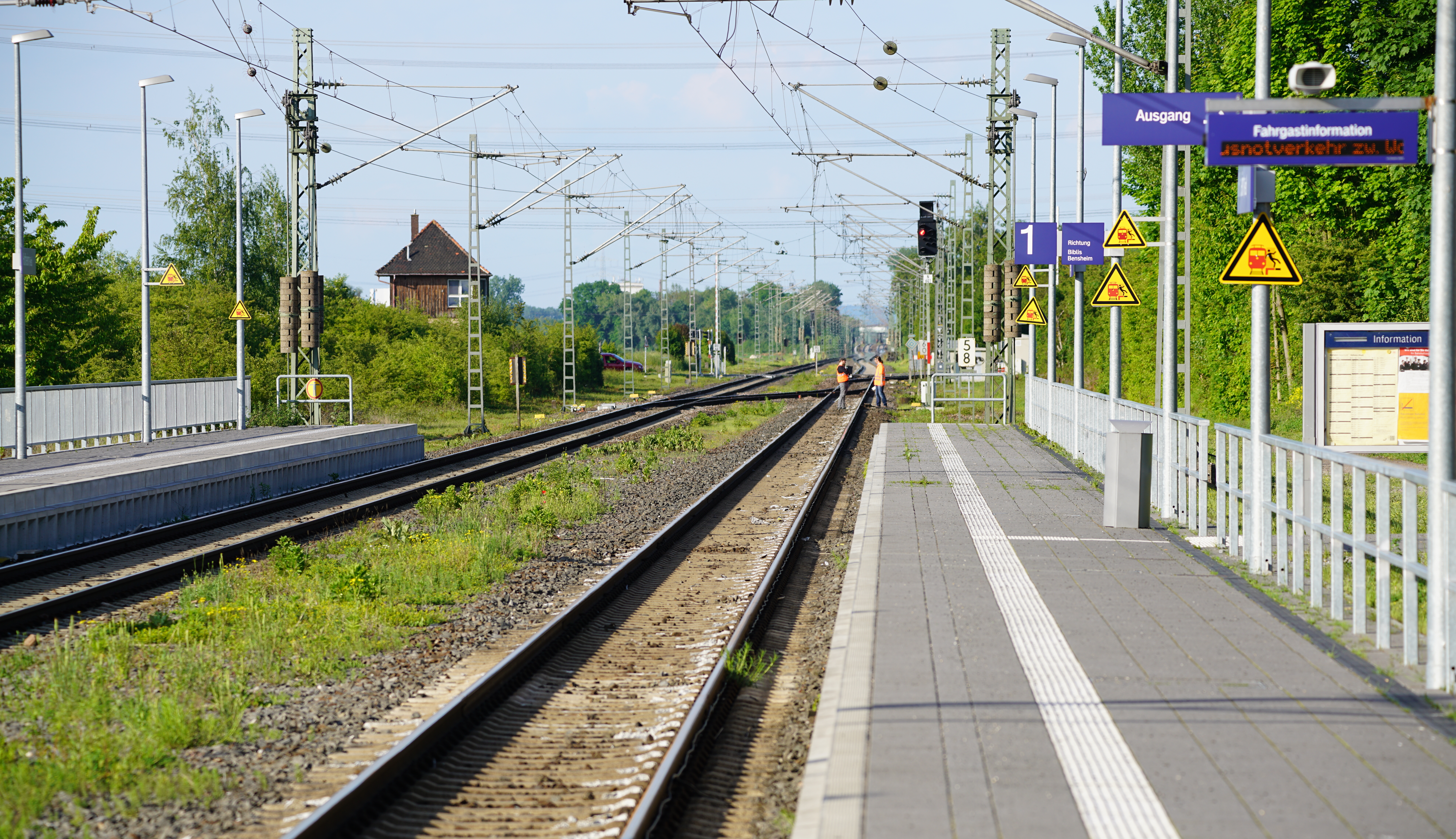 Schäden nach der Fahrt eines Güterzugs mit einem entgleisten Wagen im Bahnhof Hofheim (Ried) auf der Gemarkung der Stadt Lampertheim in Hessen